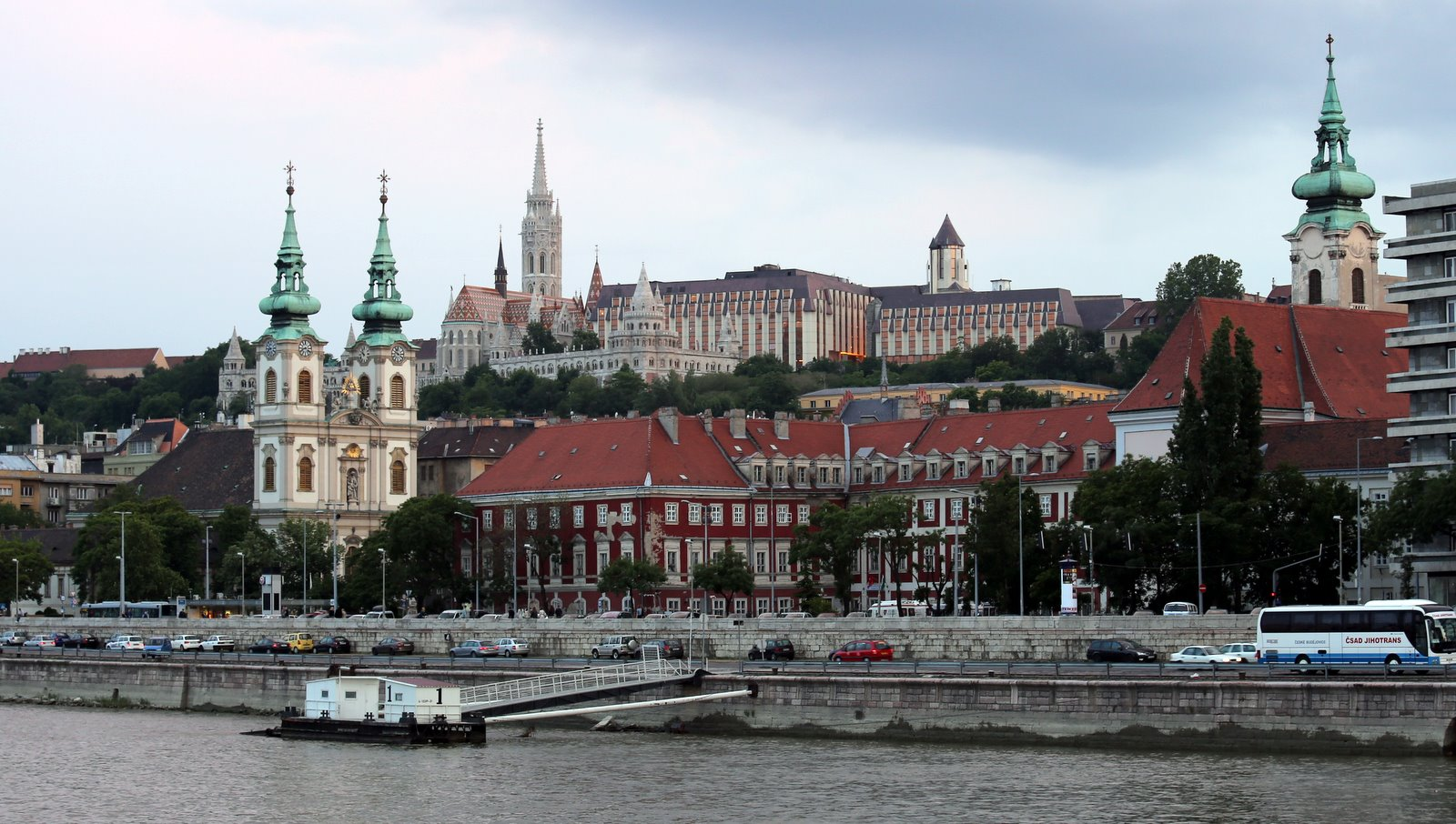 A Felső-Víziváros és Mátyás-templom látványa a Dunáról